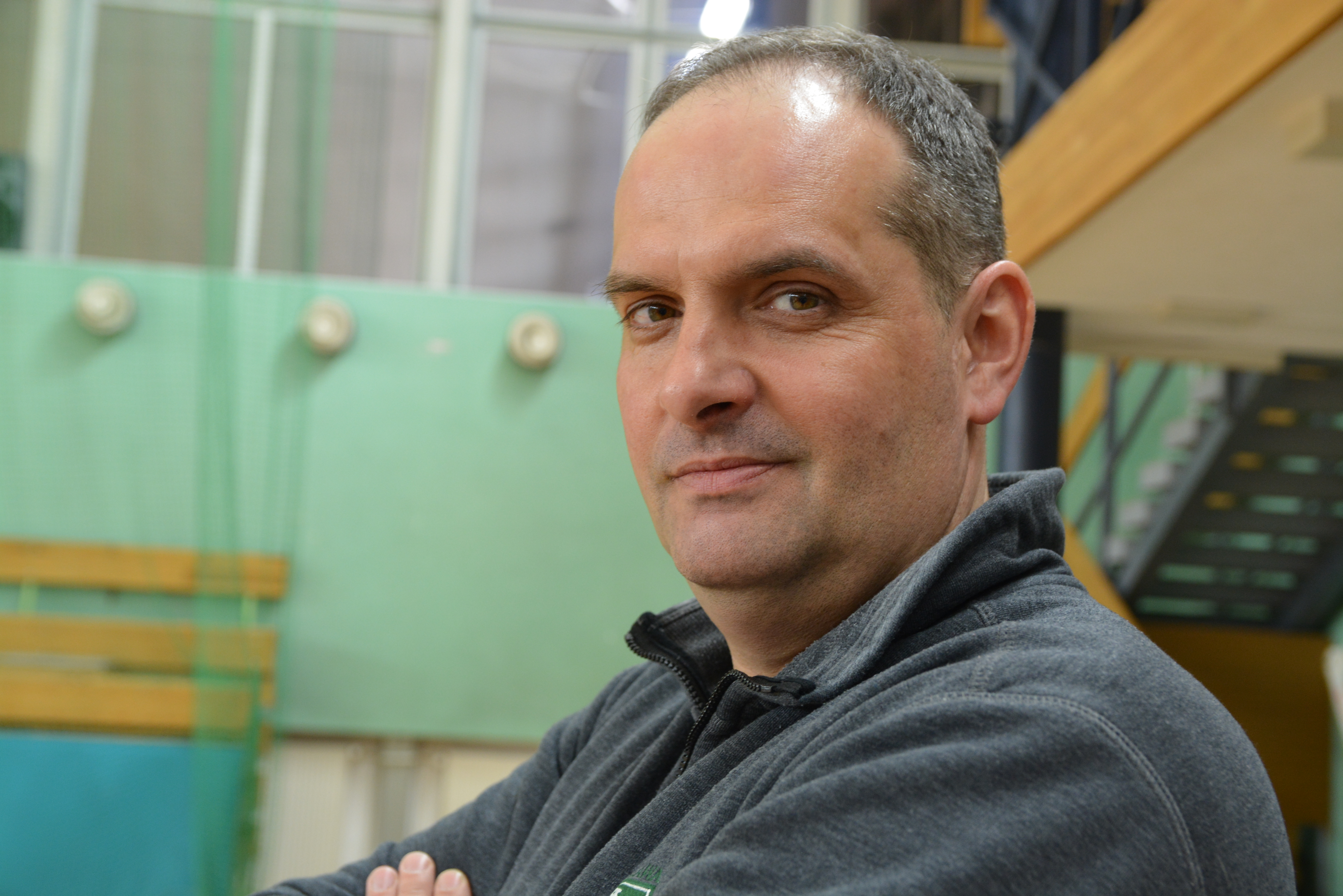 Paweł podczas meczu siatkarek, które wspiera jego Fundacja.